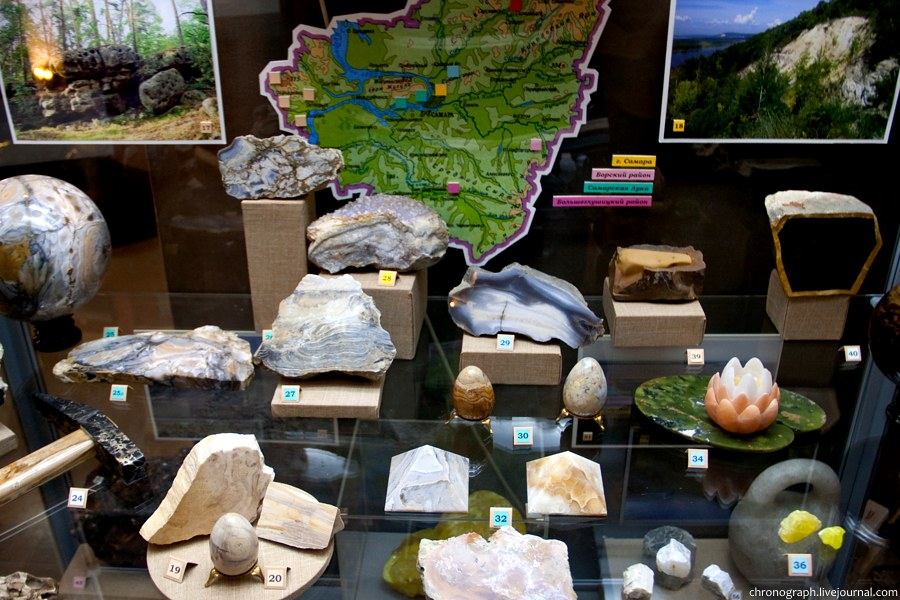 Коллекция минералов, Историко-краеведческий музей им. П. В. Алабина в Самаре